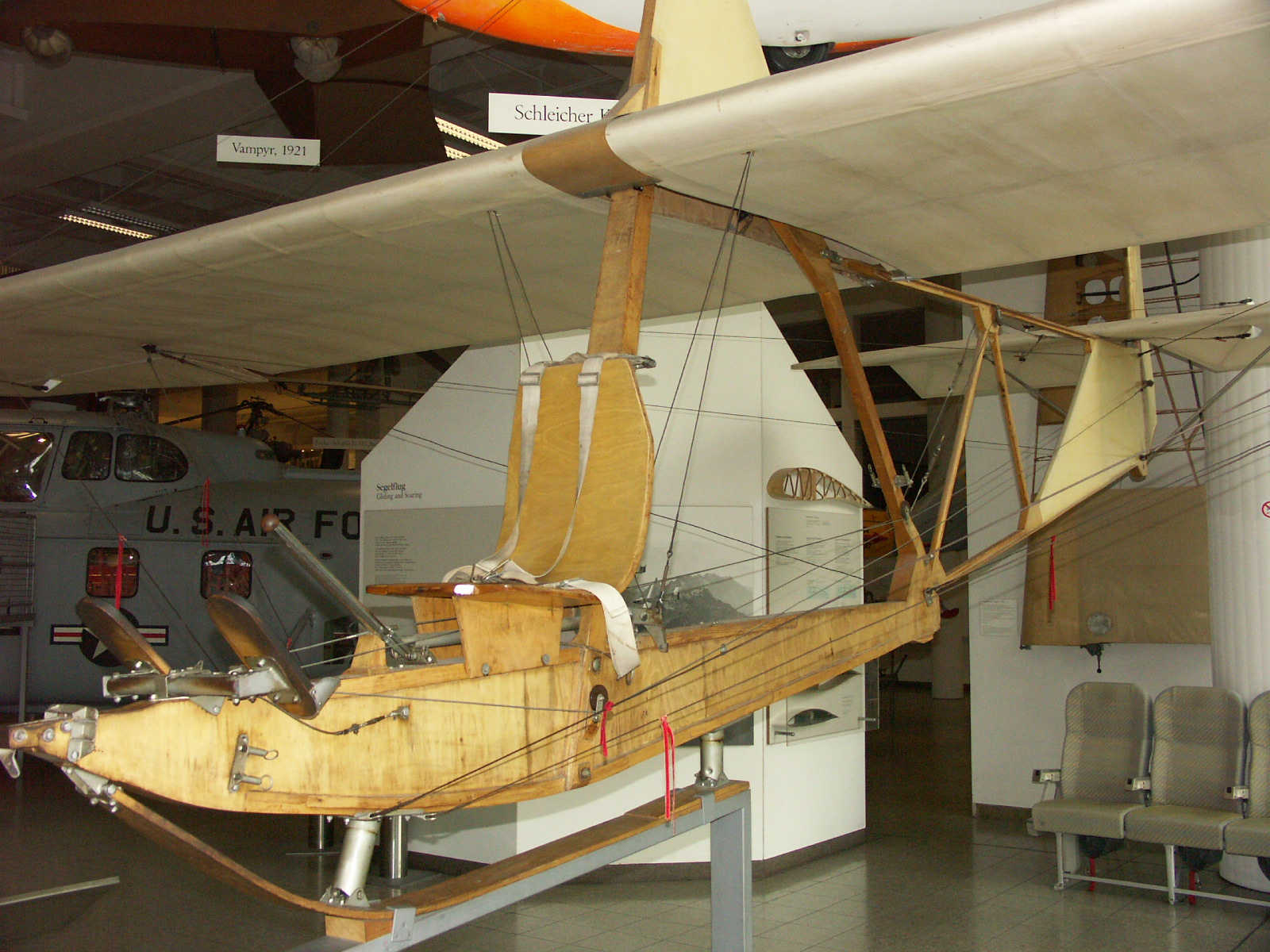 Planeur école Schneider SG_38 Photo: Jean-Patrick Donzey in Deutsches Museum Munich